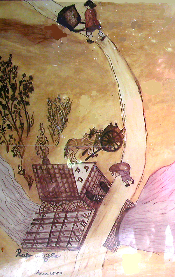 старинное изображение водяной мельницы Раде